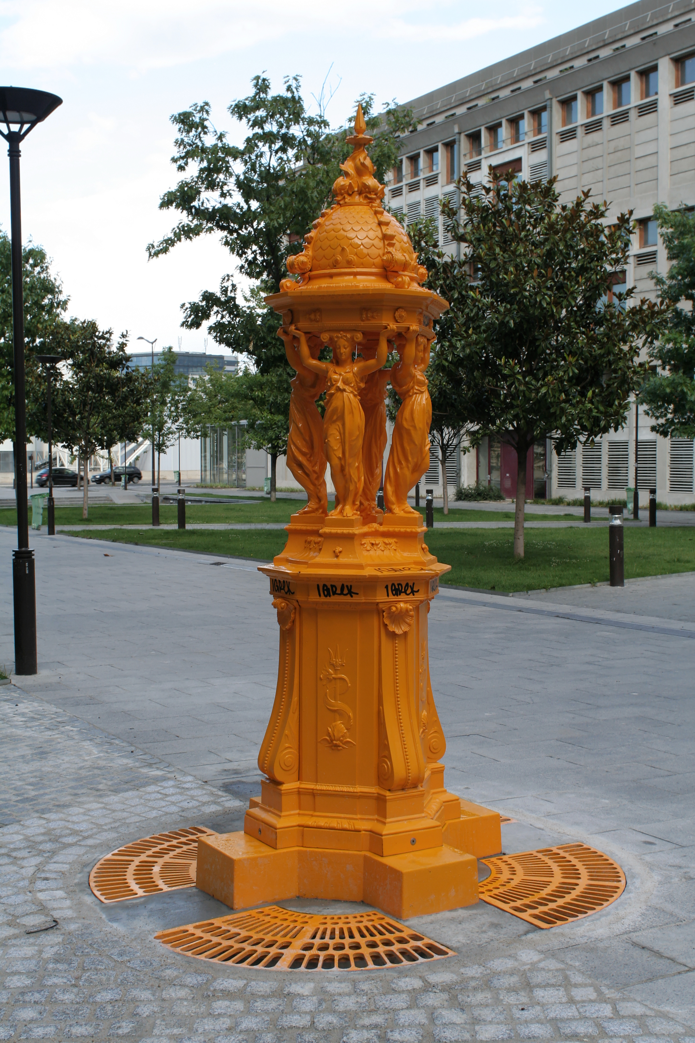 Fontaine Wallace de l'esplanade Pierre-Vidal-Naquet.